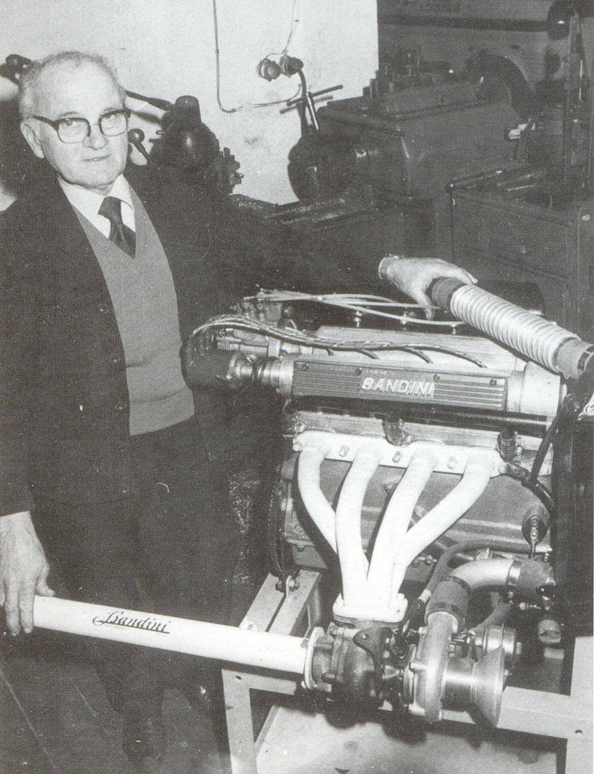 Ilario Bandini con l'ultimo motore Bandini 1000 turbo iniezione tratto da Libro: Bandini (storia della vita e automobili di Ilario Bandini)